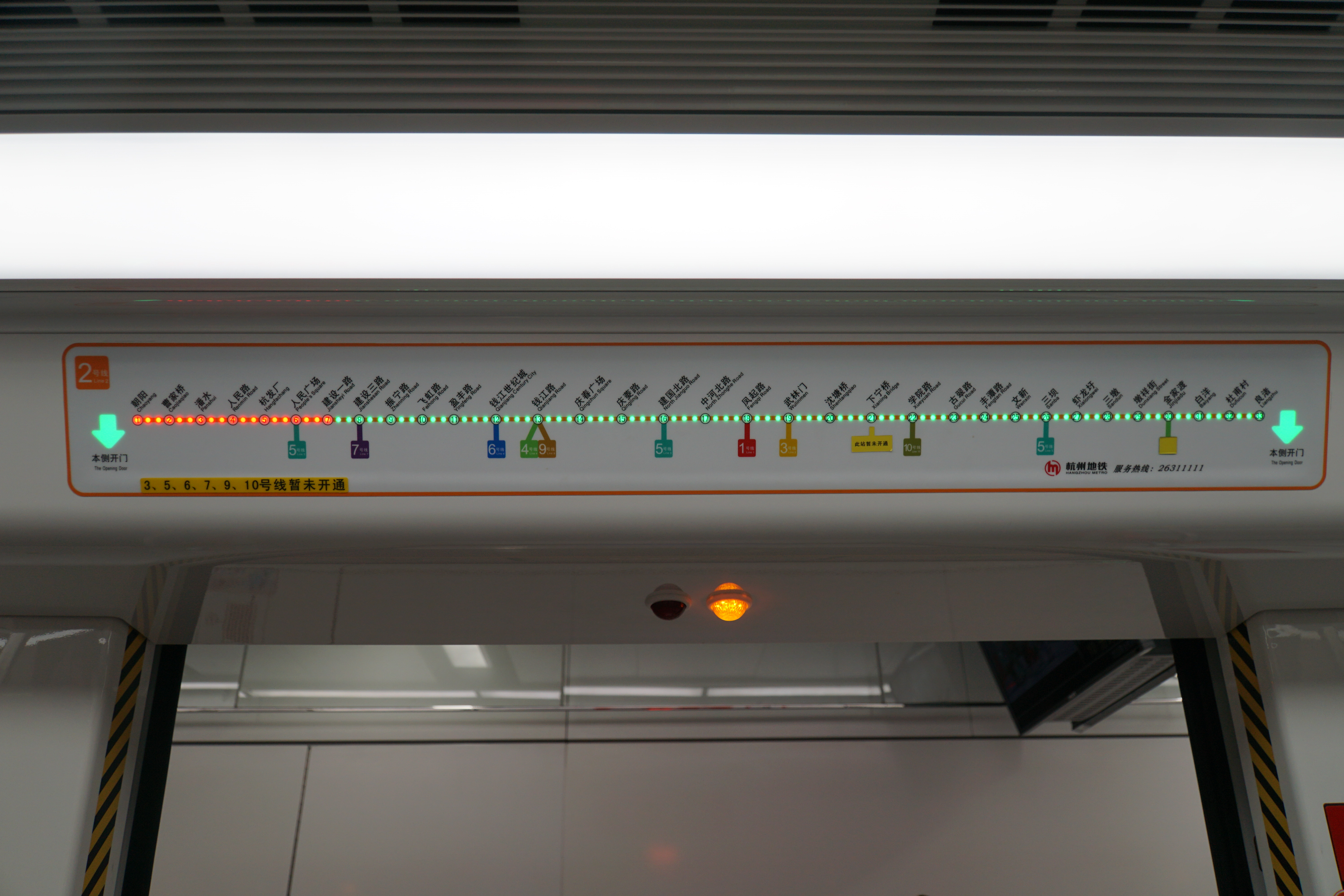 杭州地铁2号线LED闪灯路线图